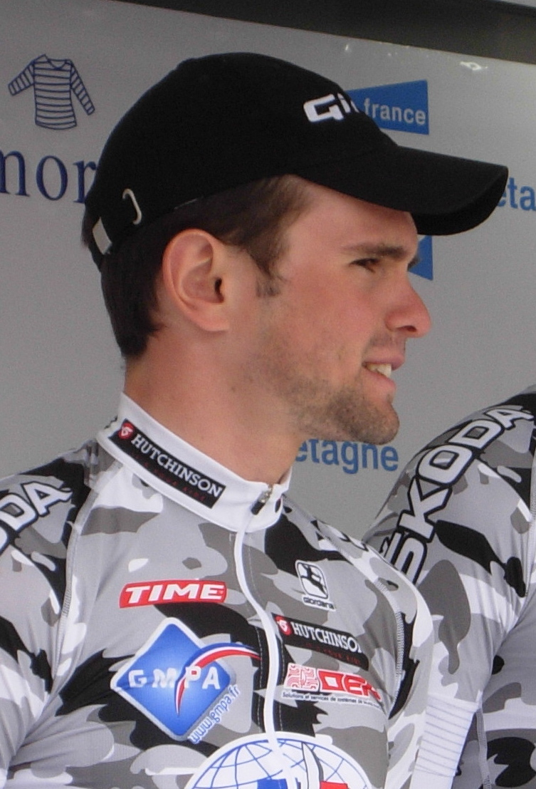 Tour de Bretagne 2013 - Présentation des équipes au départ de la deuxième étape à Ploemel - Équipe Armée de Terre Depicted person: Romain Combaud